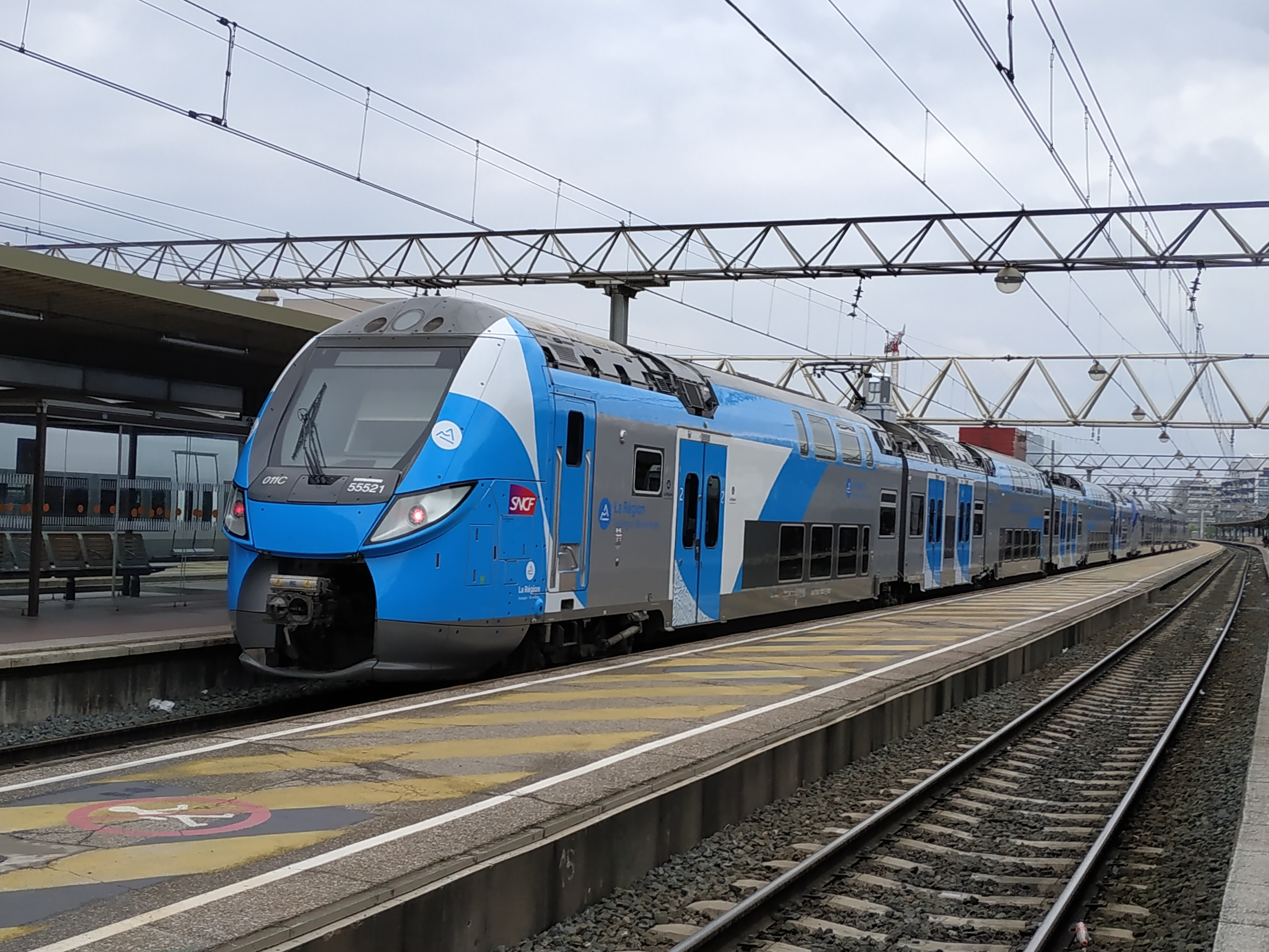 Z55500 TER Auvergne-Rhône-Alpes, en gare de Lyon-Part-Dieu